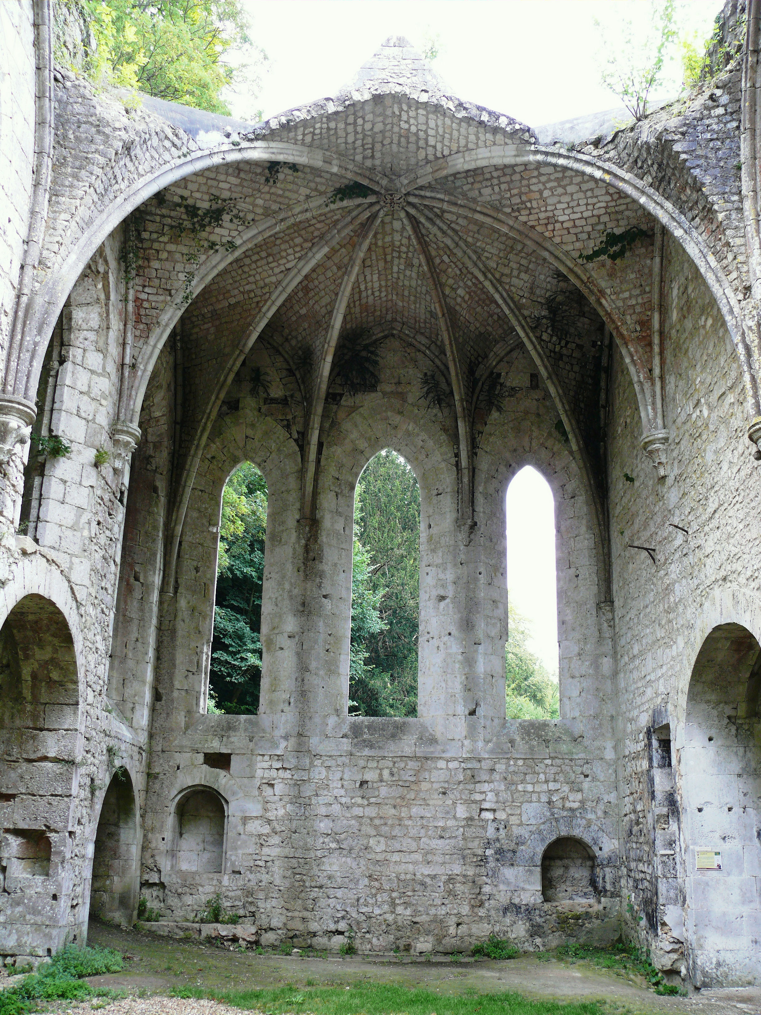 Abbaye Notre-Dame de Fontaine-Guérard - Eglise